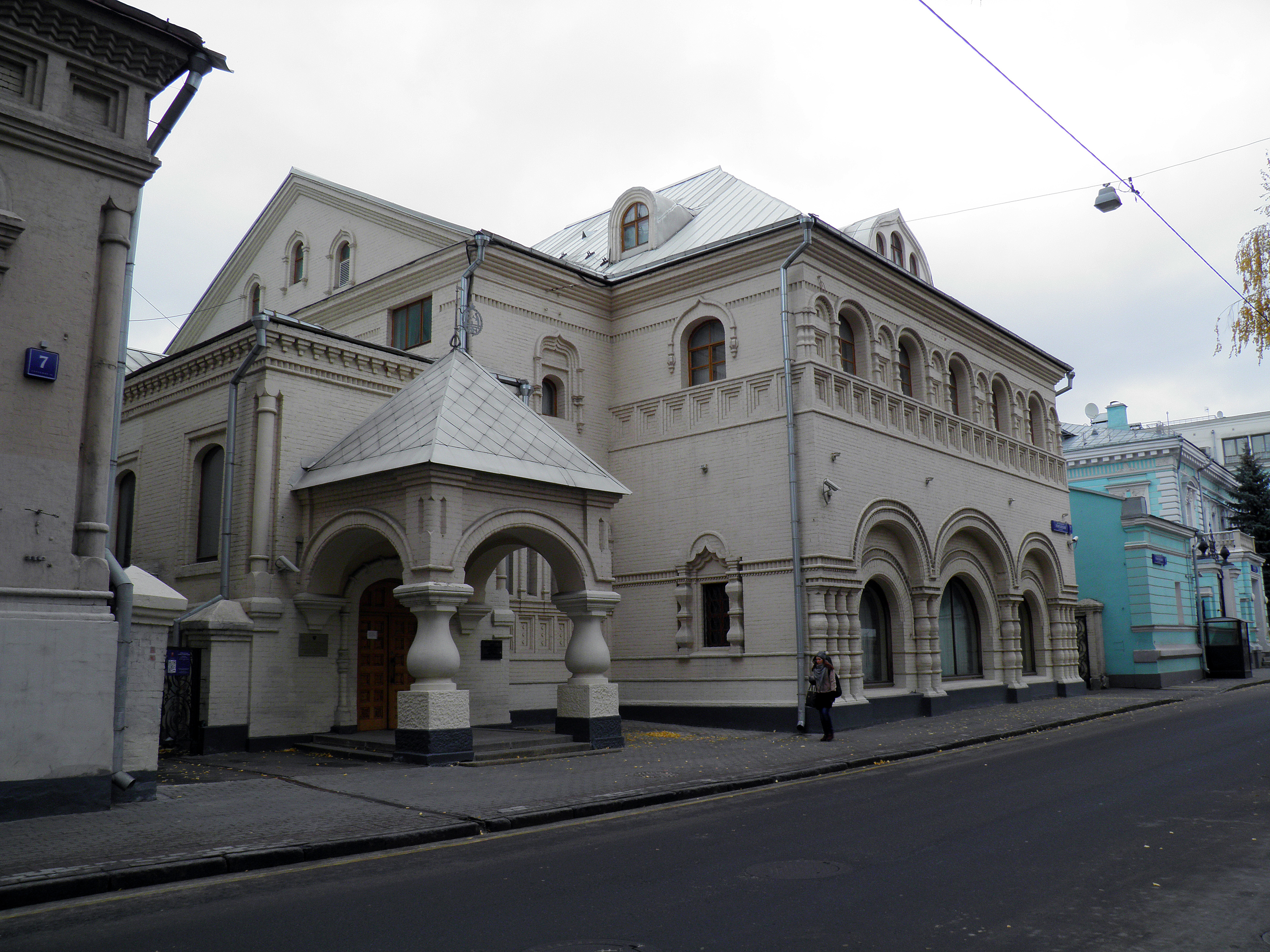 Музей кустарных изделий (Музей народного творчества) (Москва и Московская область, Москва, Леонтьевский переулок, 7, строение 1-а, 1-б)